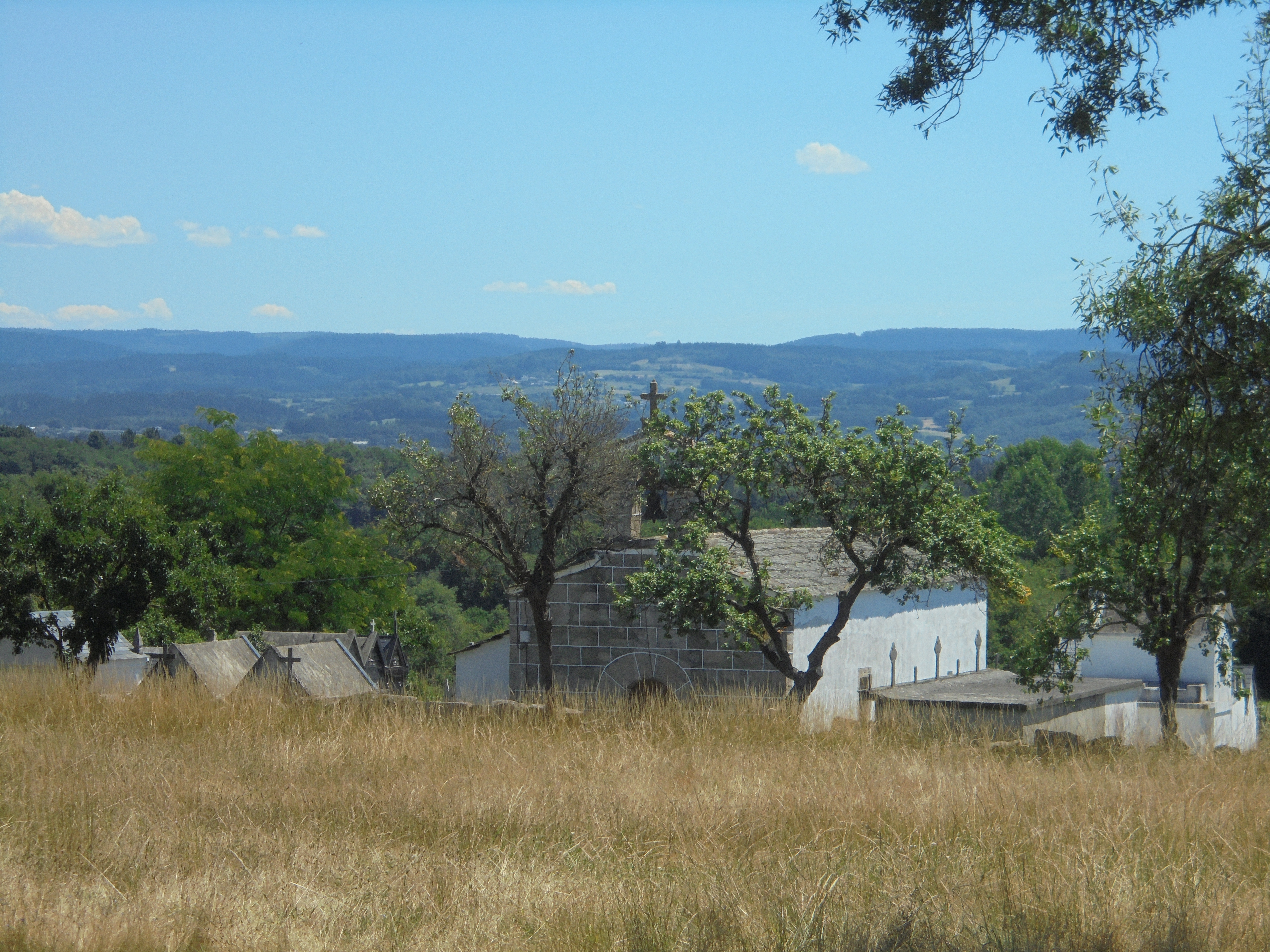 Igrexa parroquial de Lapío ( O Corgo)